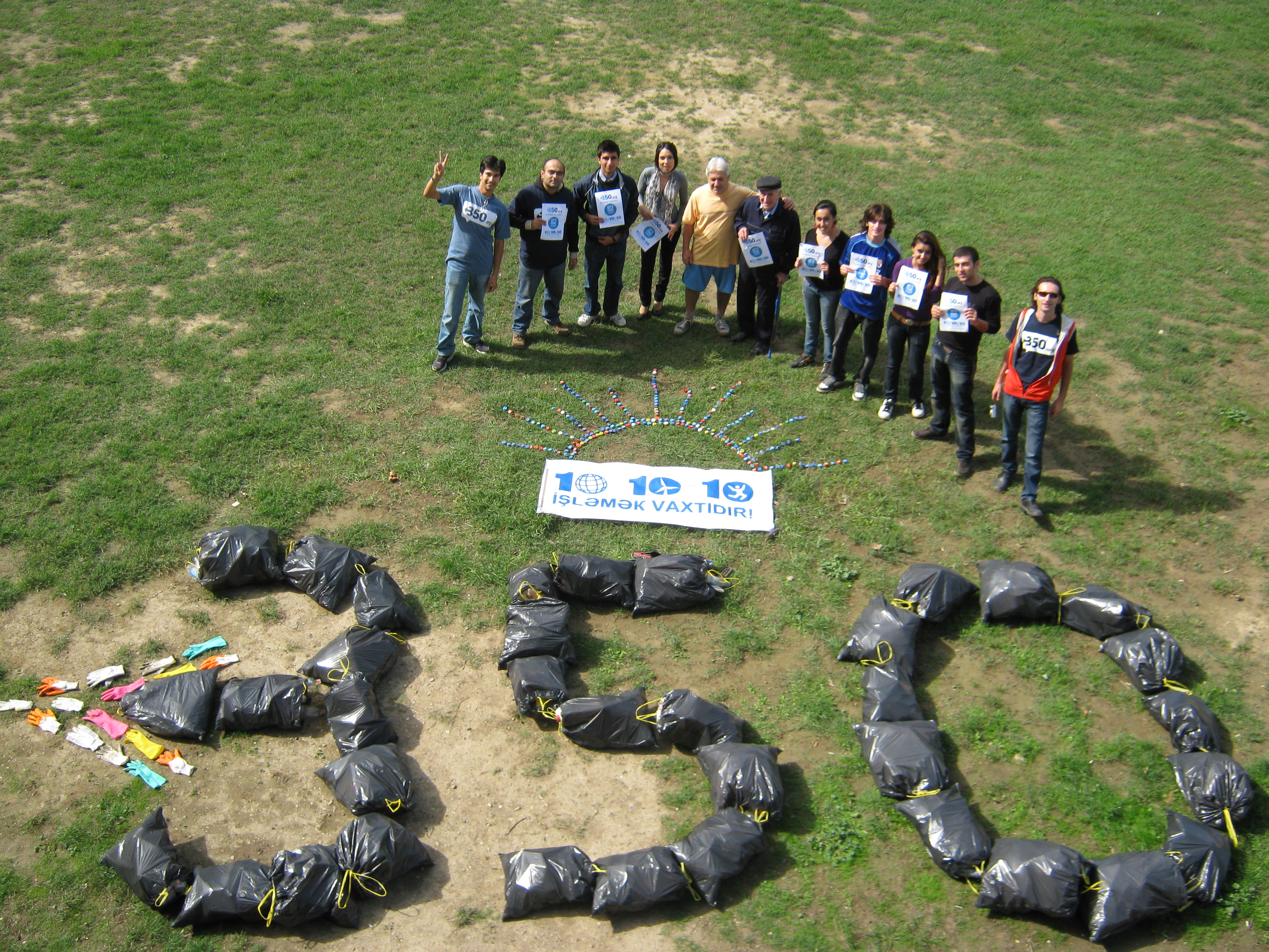 Стадион Мехсул. Зелёные на уборке. Охота на пластик. Зелёный Баку. Грин Баку. Green Baku.